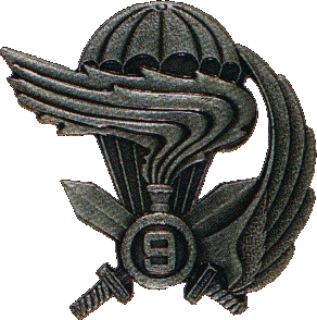 Fregio da basco del 9° Reggimento Paracadustisti d'Assalto "Col Moschin"